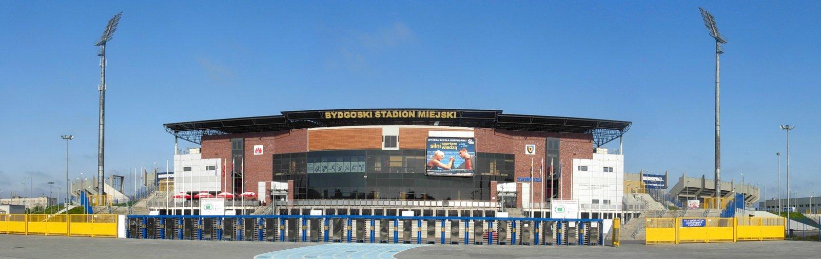 Budynek frontowy trybuny głównej stadionu Zawiszy Bydgoszcz